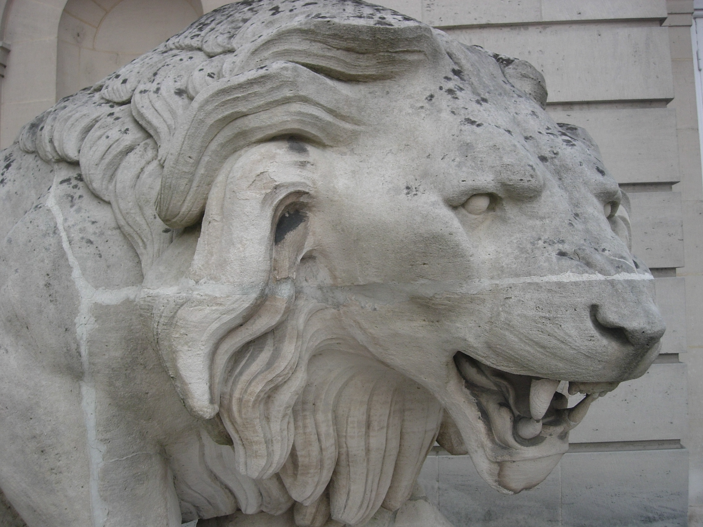 Lion de la préfecture de Troyes